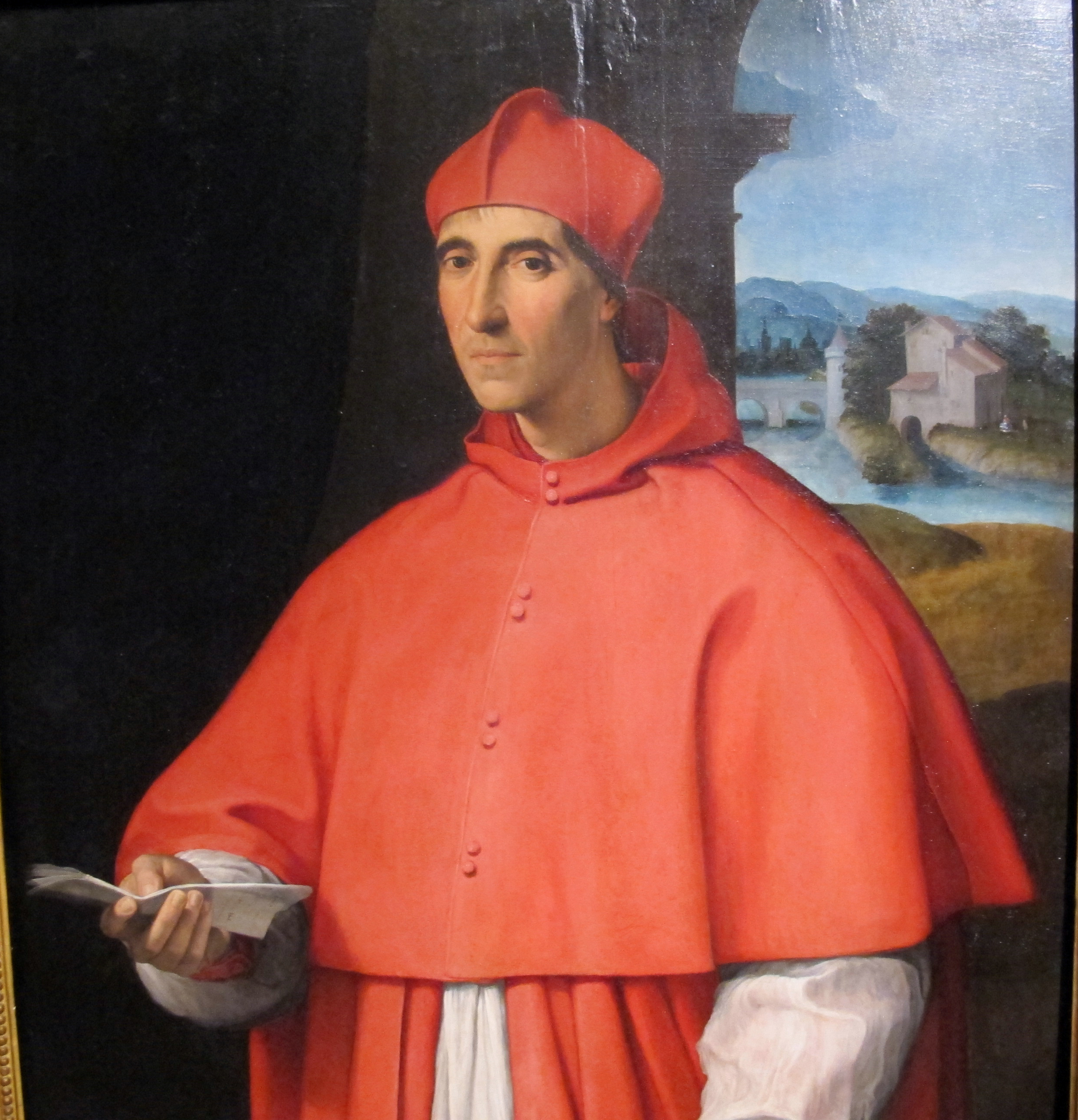 Ritratto del cardinale Alessandro Farnese, futuro papa Paolo IIIPotrait of Cardinal Alessandro Farnesetitle QS:P1476,it:"Ritratto del cardinale Alessandro Farnese, futuro papa Paolo III" label QS:Lit,"Ritratto del cardinale Alessandro Farnese, futuro papa Paolo III" label QS:Len,"Potrait of Cardinal Alessandro Farnese"